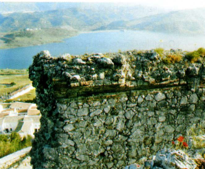 Lo que queda del Arco de la Puerta de entrada a la Villa